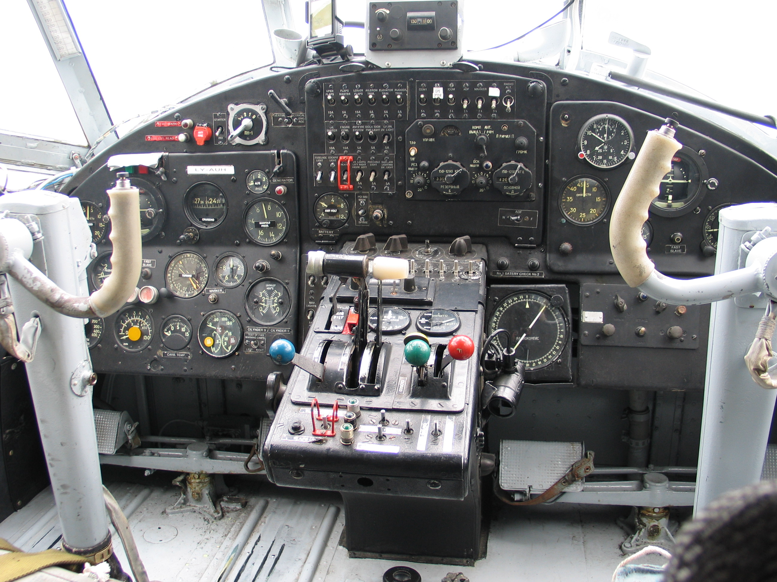 Antonov An-2 cockpit